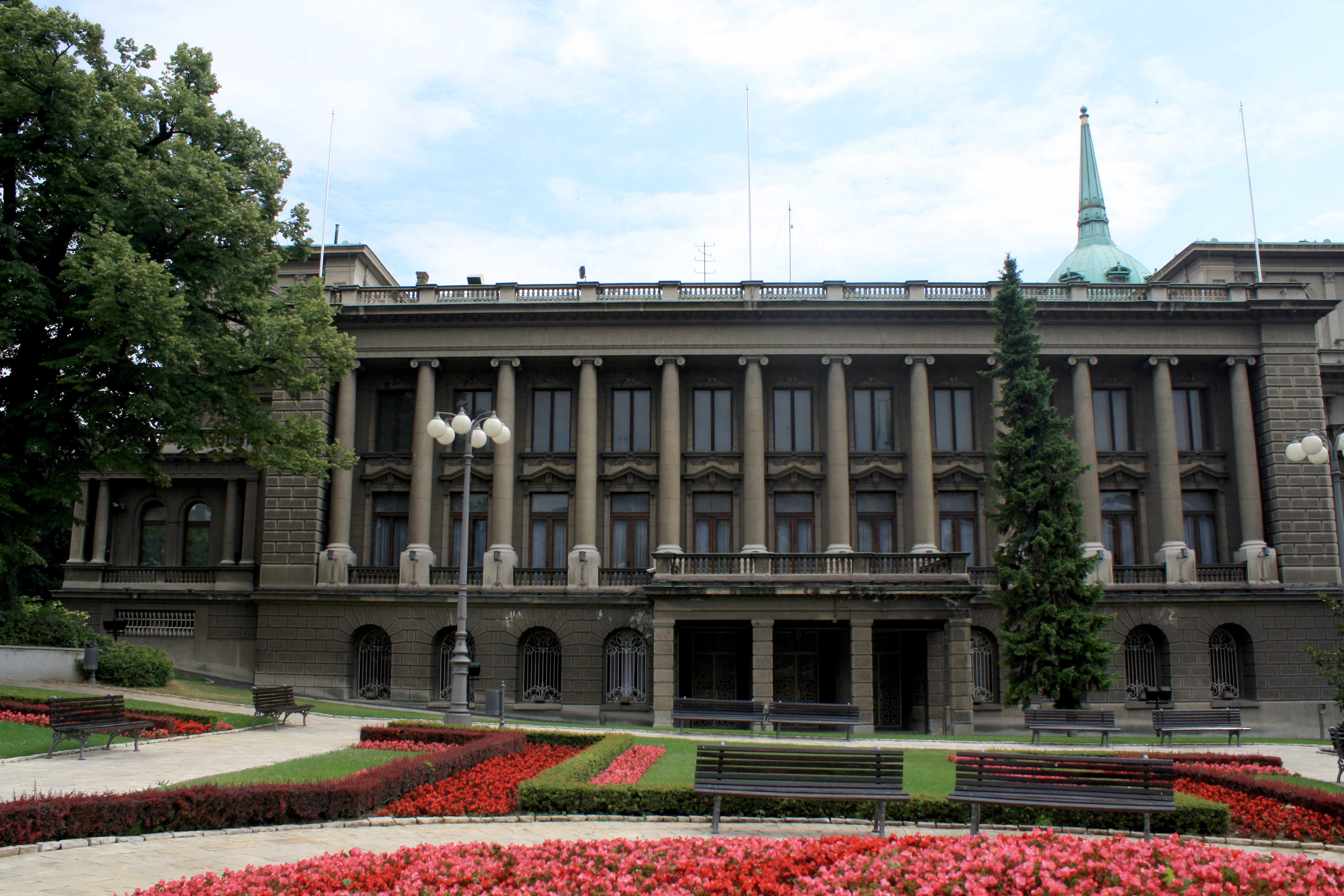 Зграда Новог двора у Београду.